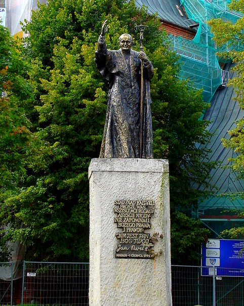 Pomnik Jana Pawła II przed koszalińską katedrą